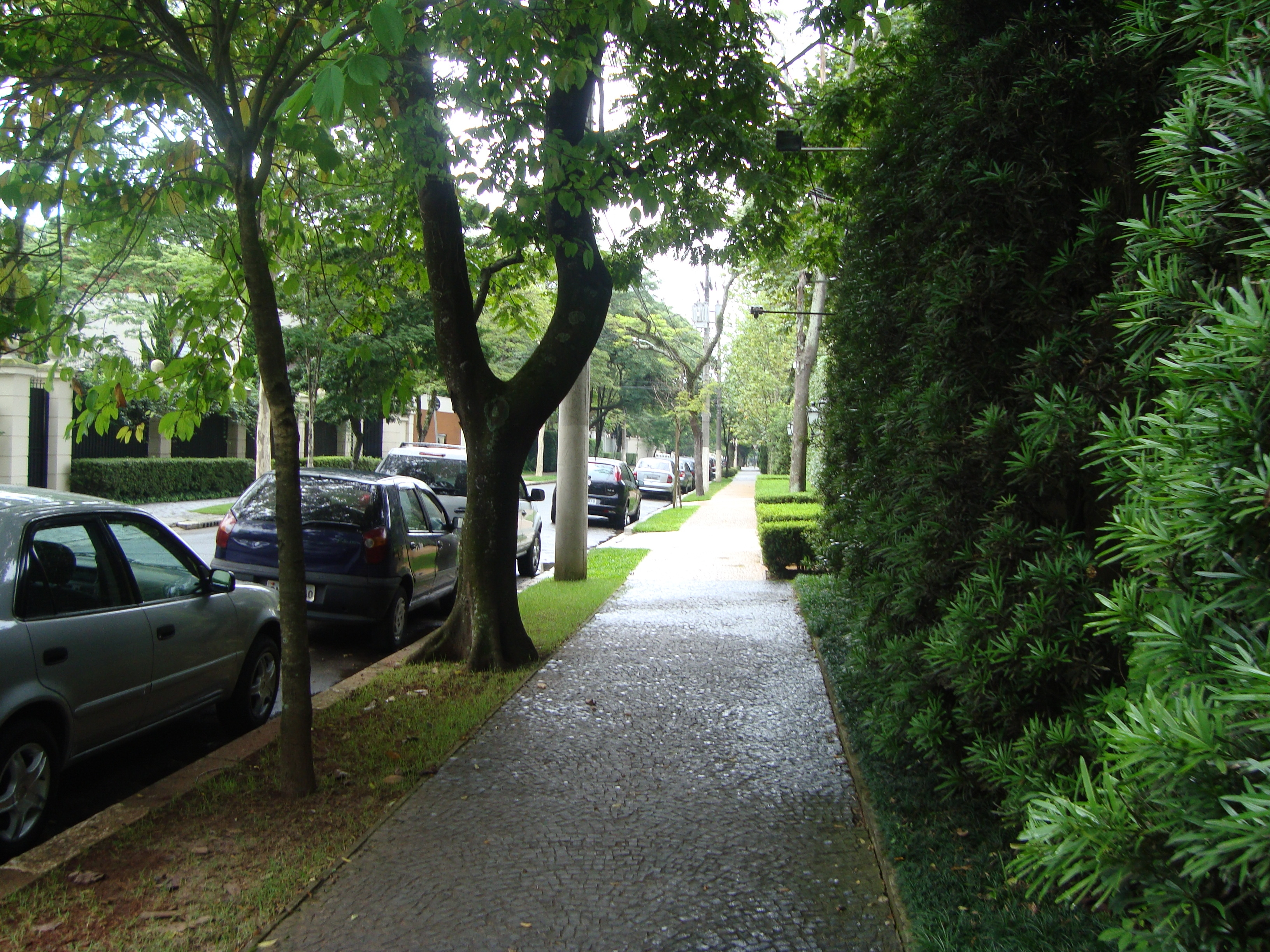 Foto das calçadas extremamente arborizadas do bairro de Jardim América, zona oeste da cidade de São Paulo